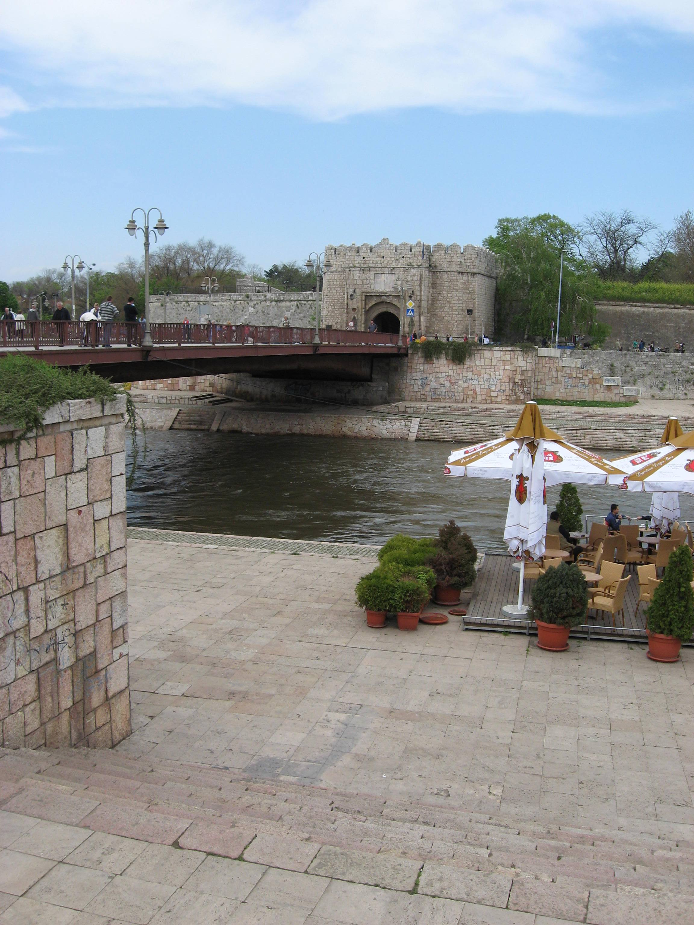 Нишка тврђава